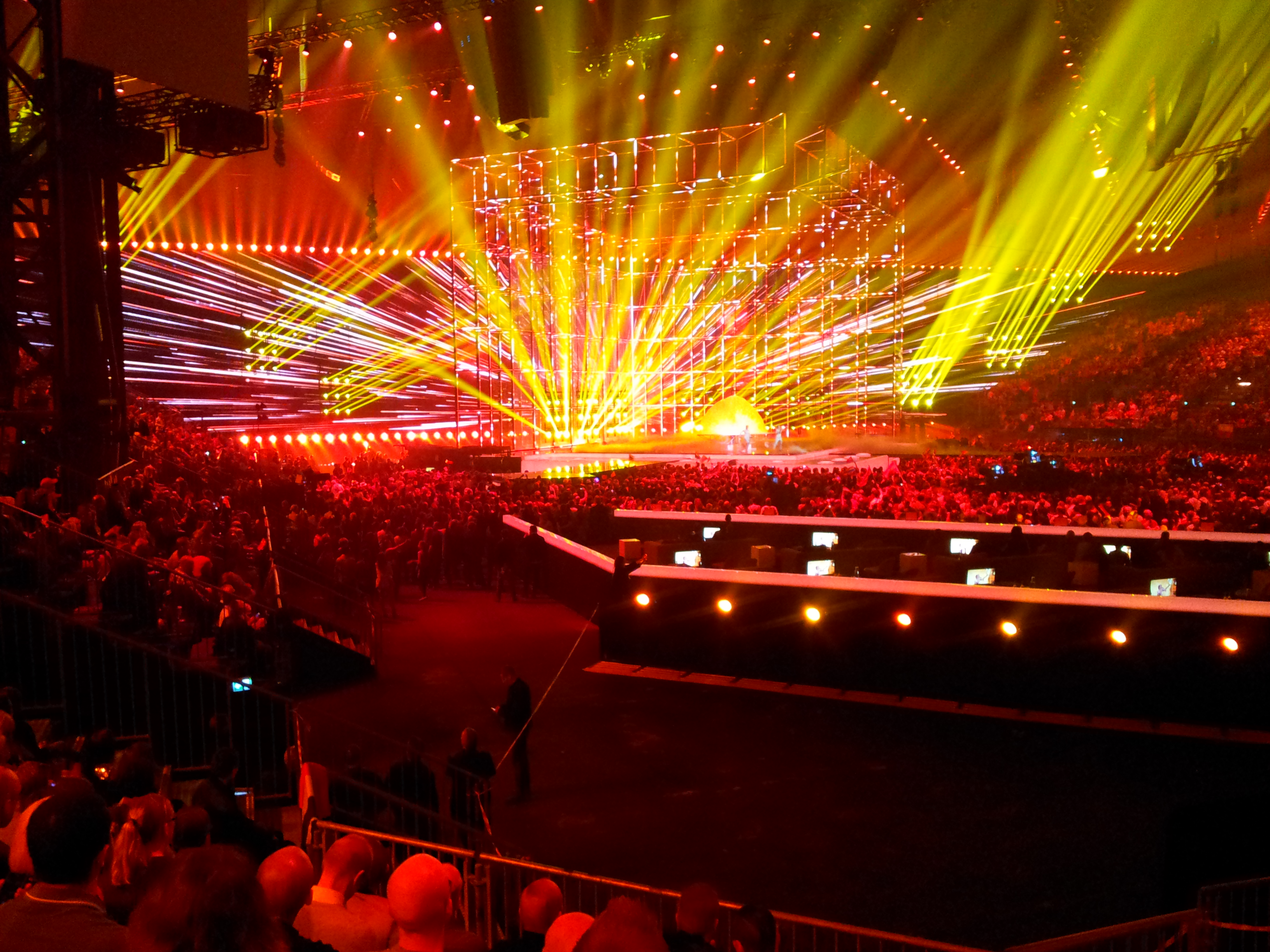 Eurovision Song Contest 2014